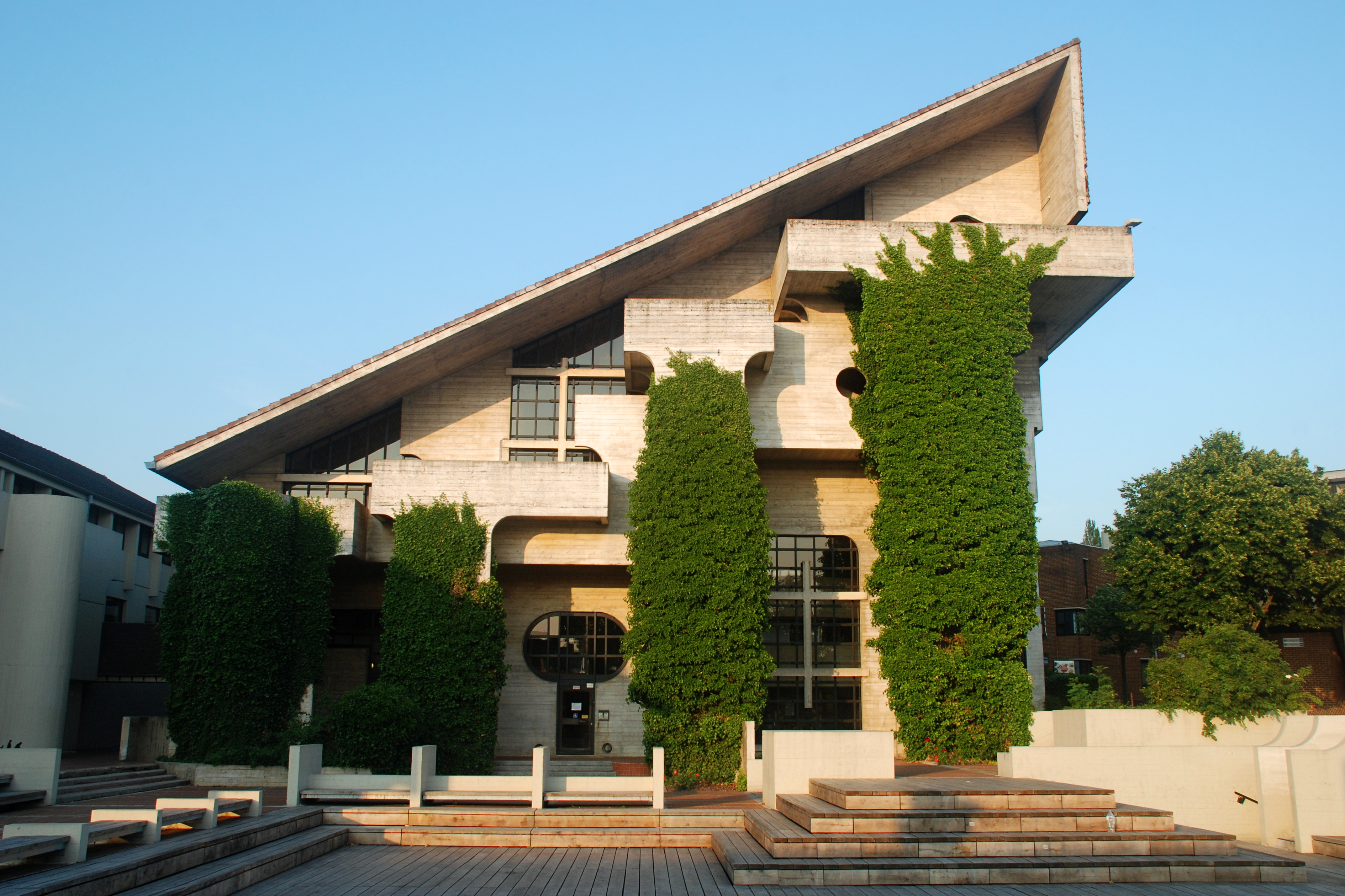 Belgique - Louvain-la-Neuve - Bibliothèque des Sciences (architecture brutaliste - architecte André Jacqmain - 1970-1975)